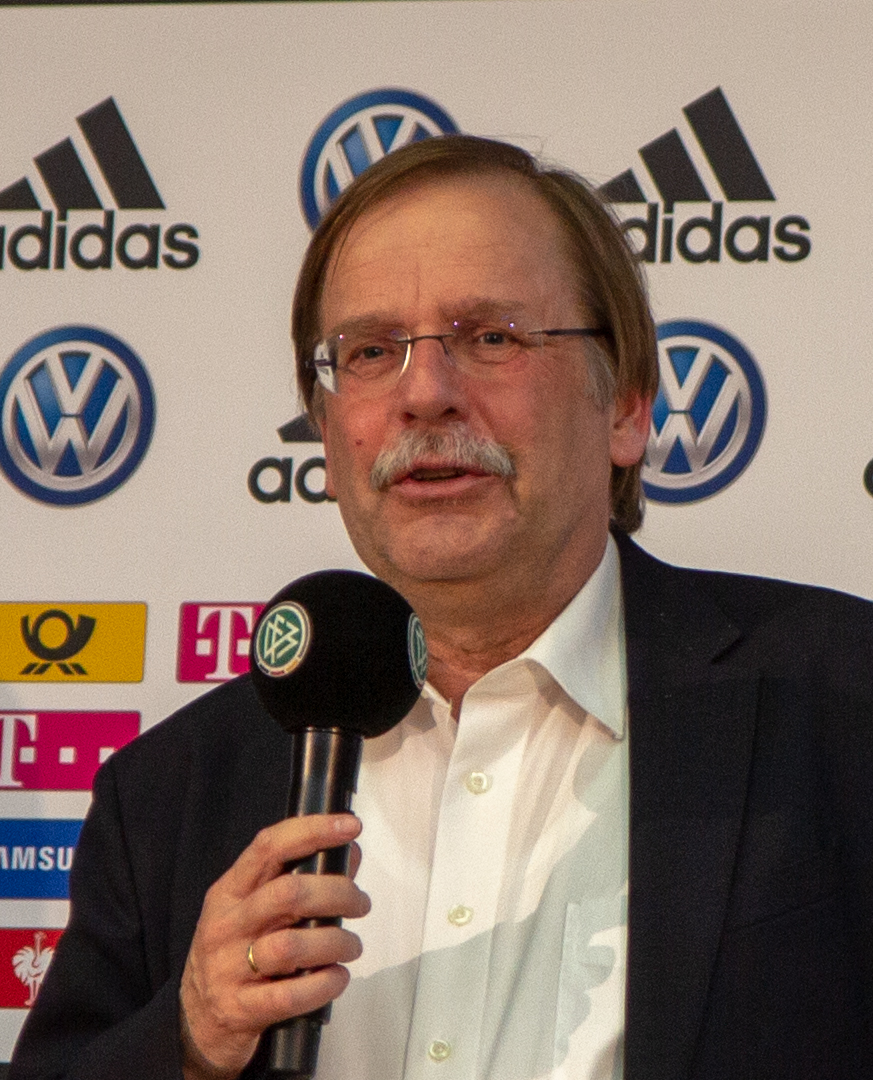 Rainer Koch